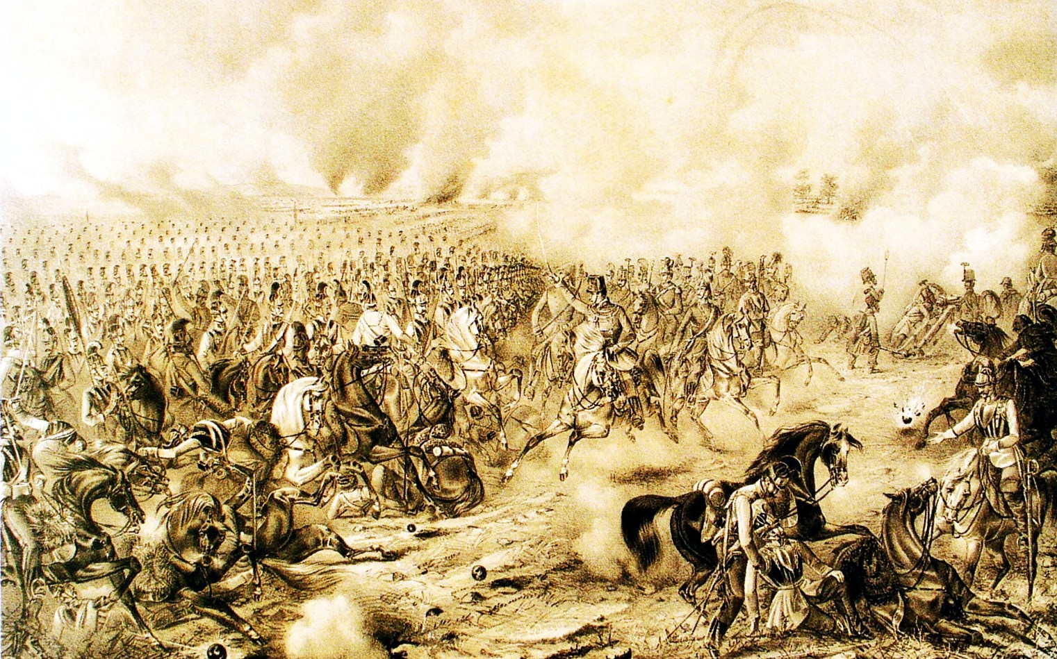 A schwechati csata. Franz Xaver Zalder litográfiája